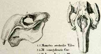 Schädel von Dugong dugon